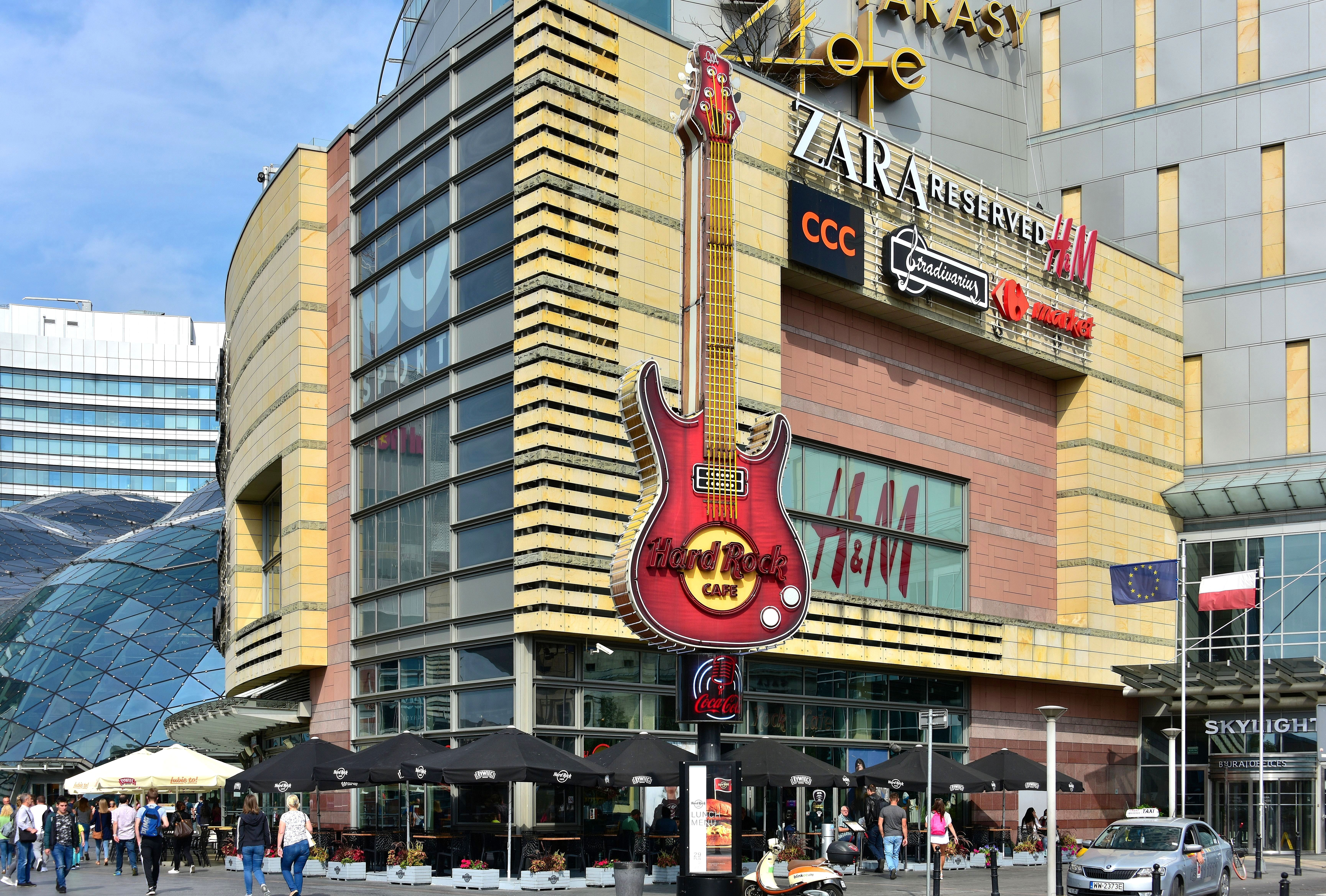 Centrum handlowe Złote Tarasy w Warszawie, siedziba Hard Rock Cafe